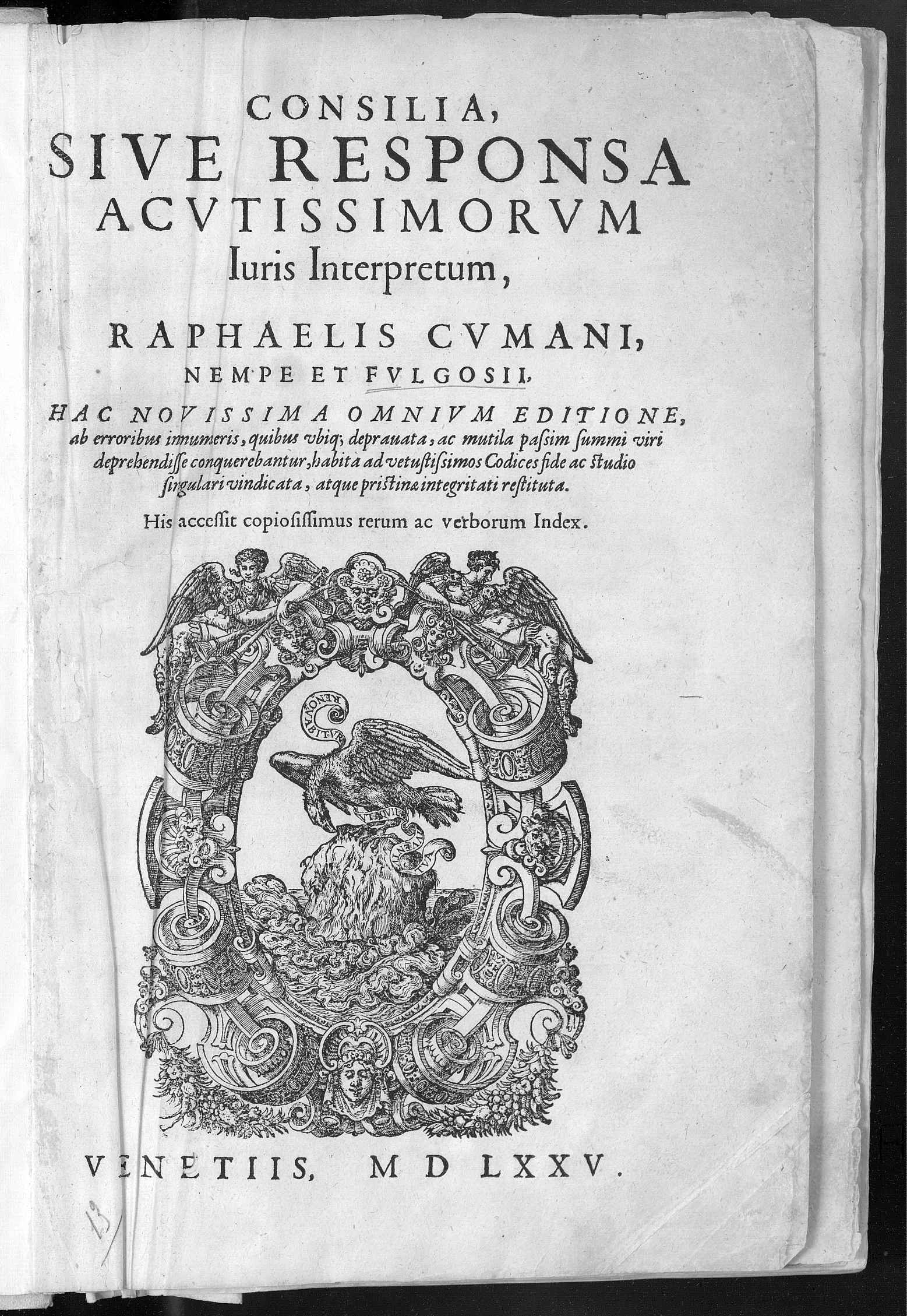 Frontespizio